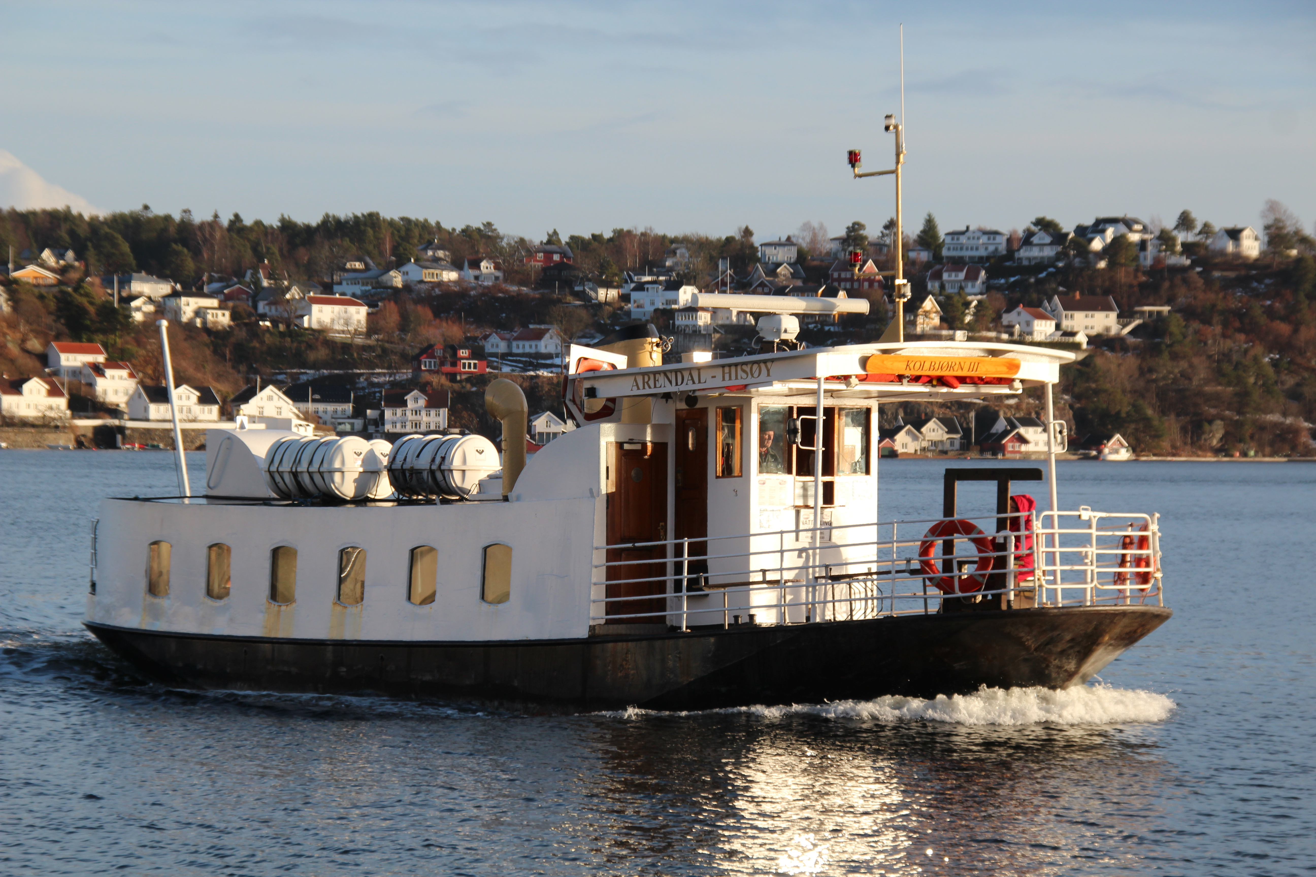 MF Kolbjørn III på vei inn til kai på Tyholmen i Arendal.